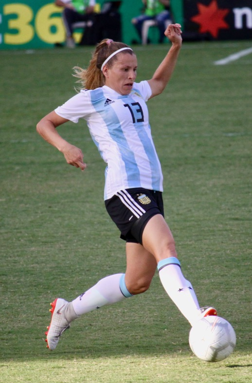 KorArg - PaulaUgarte2